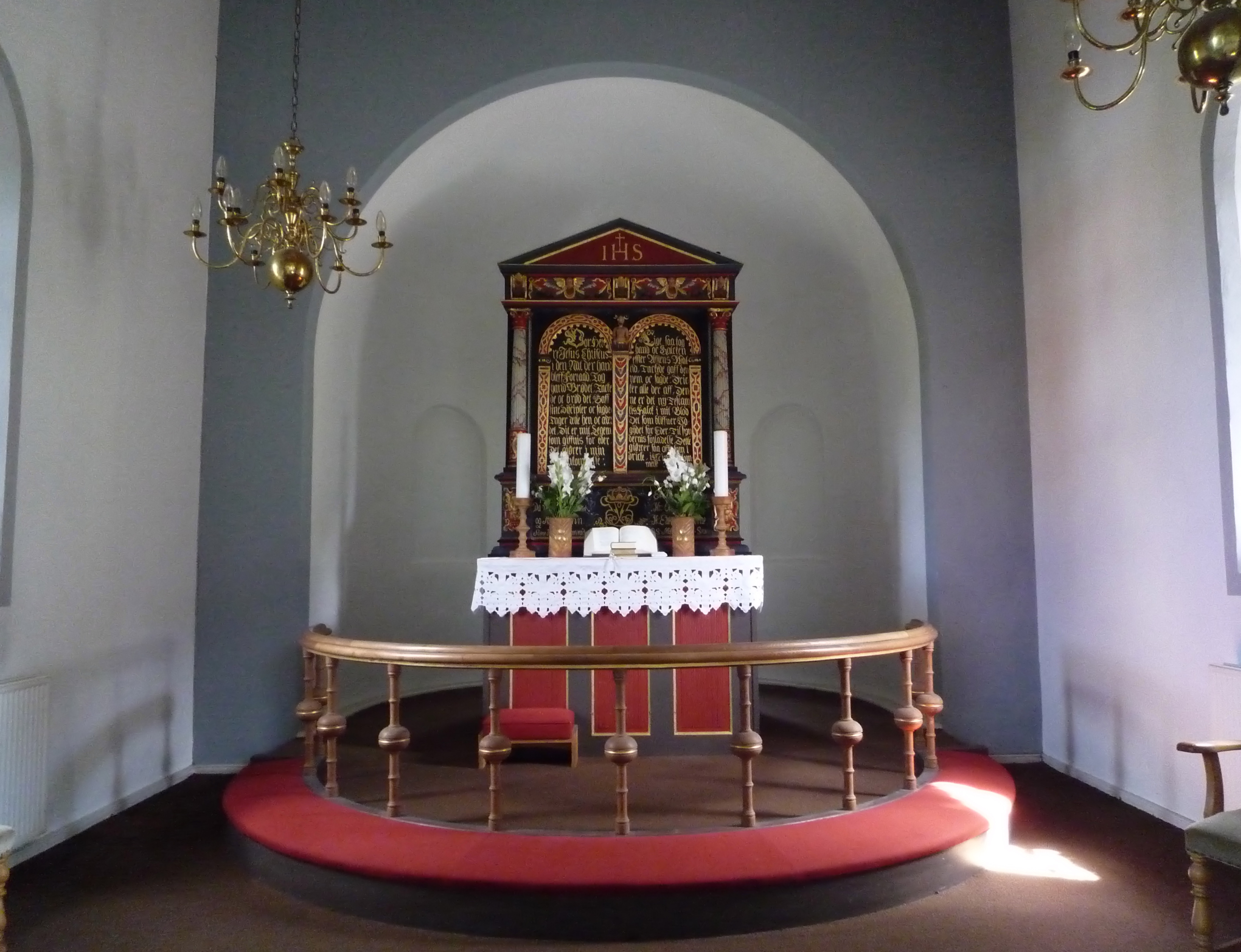 Rø Kirke on Bornholm, Denmark. Quire